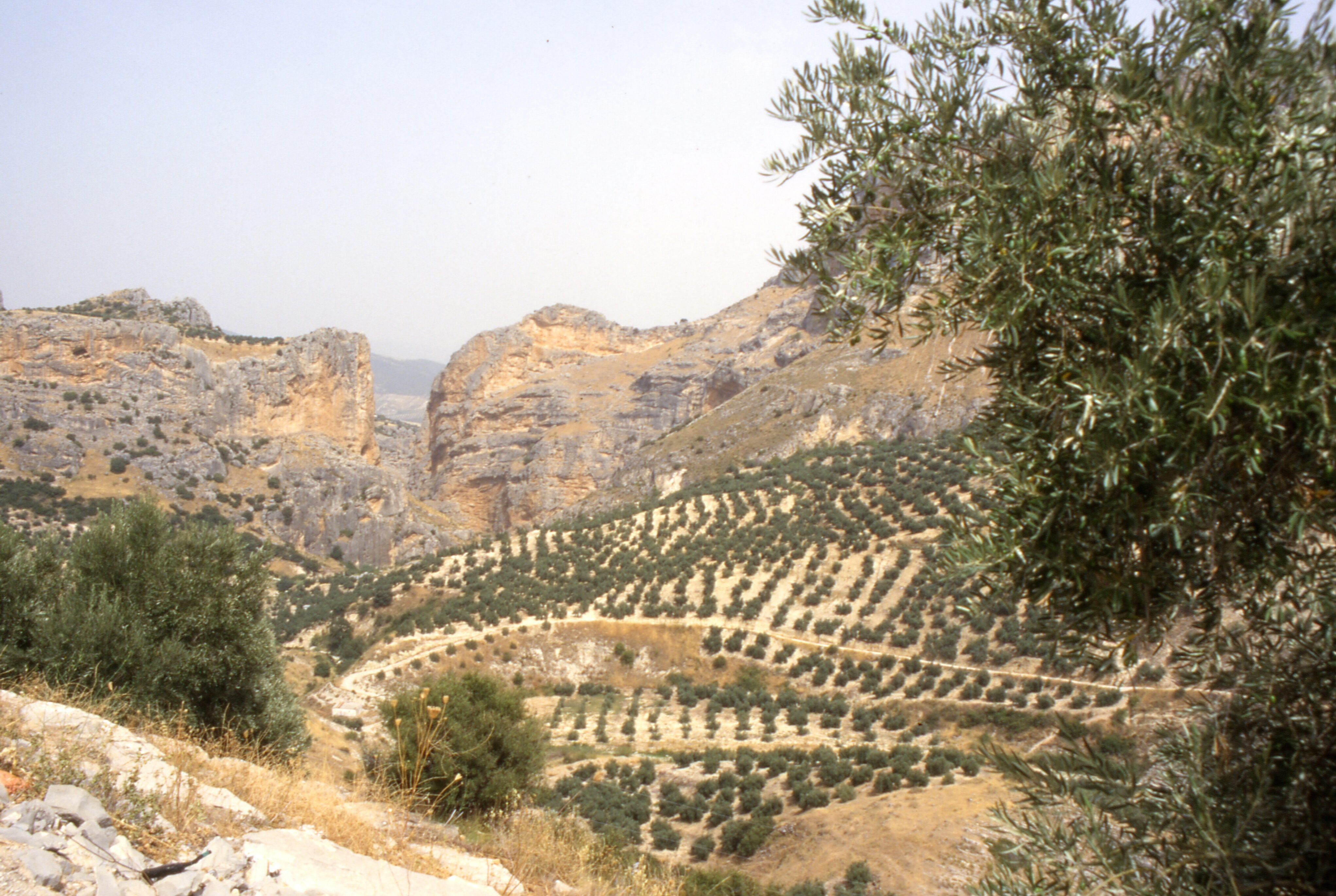 OlivenAnbauBeiJaén